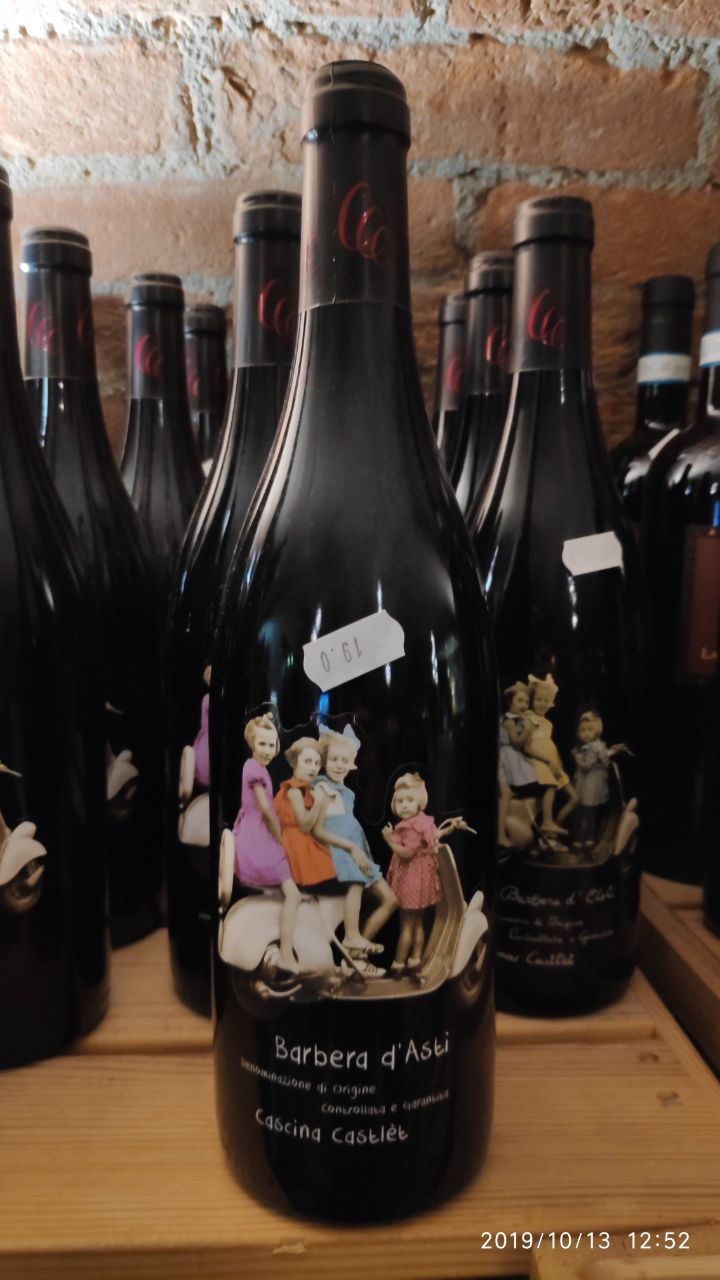 Barbera d'Asti - Cascina Castlet